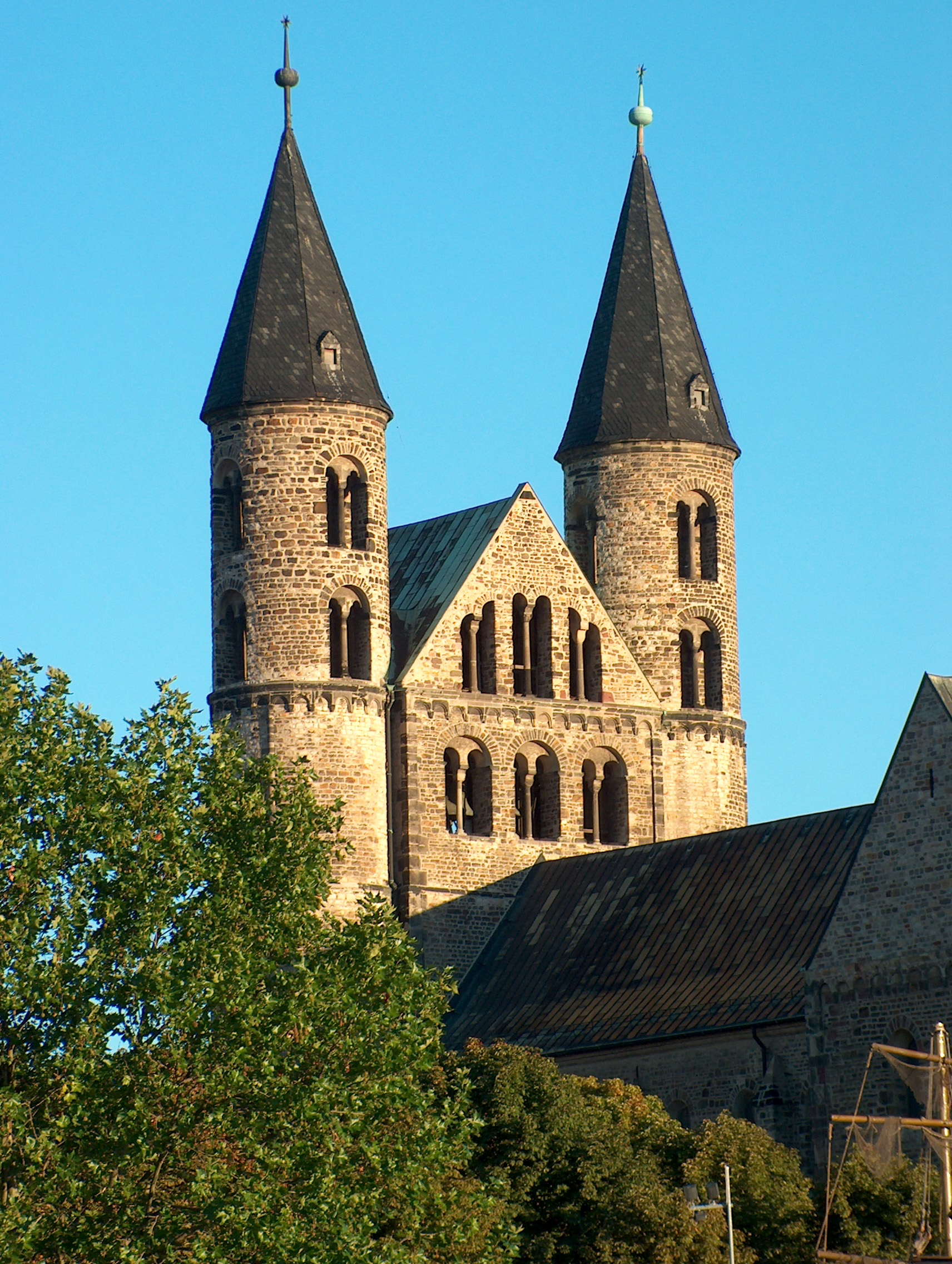 Die Klosterkirche St. Marien im Kloster unser Lieben Frauen in Magdeburg, Deutschland.